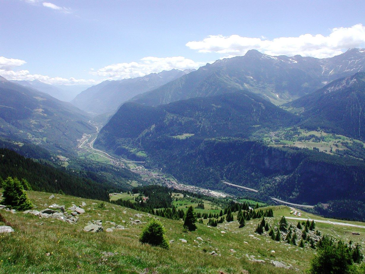 Faido visto da Somprei